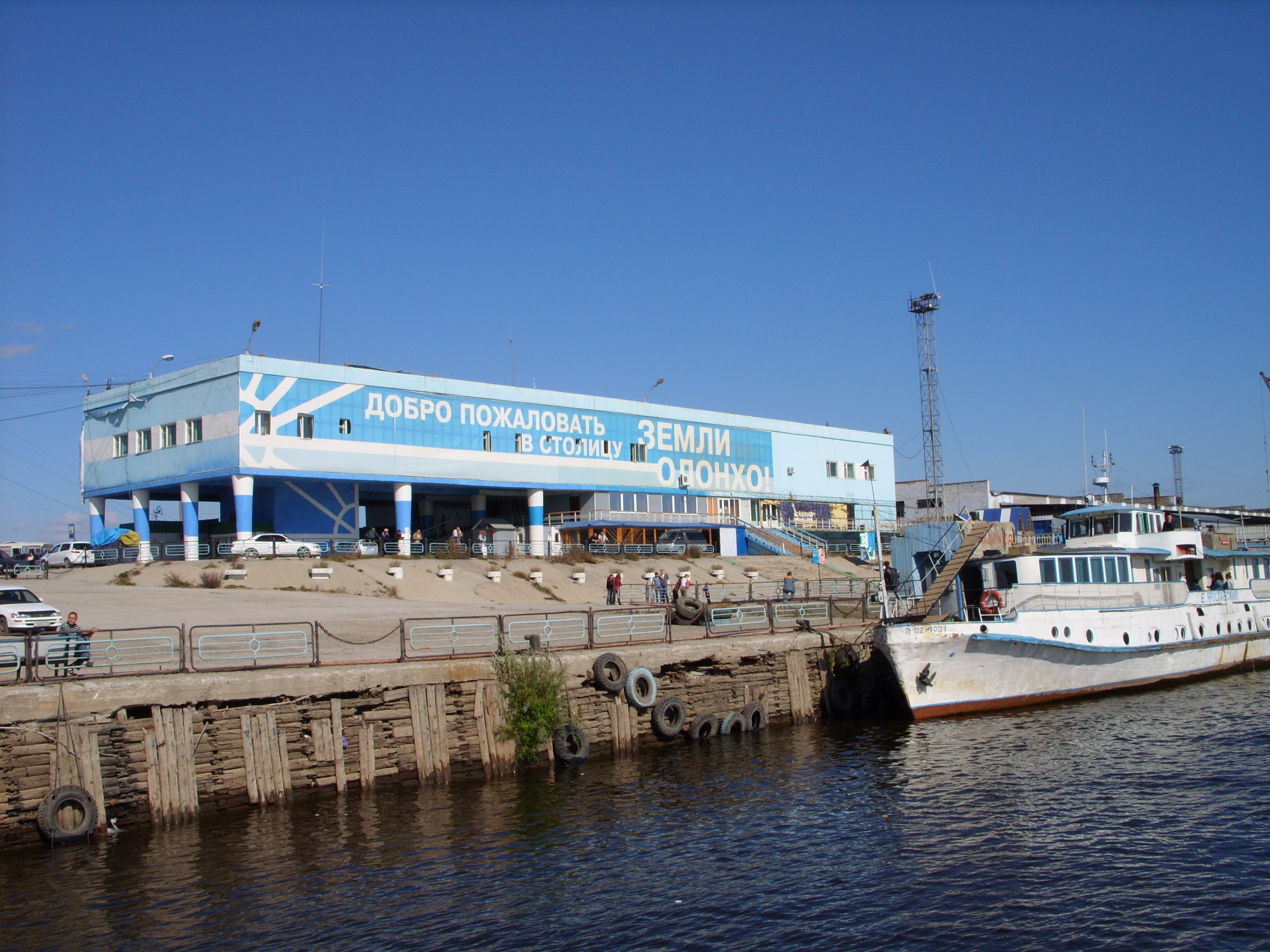 Здание речного вокзала. Снимок 2009 г.